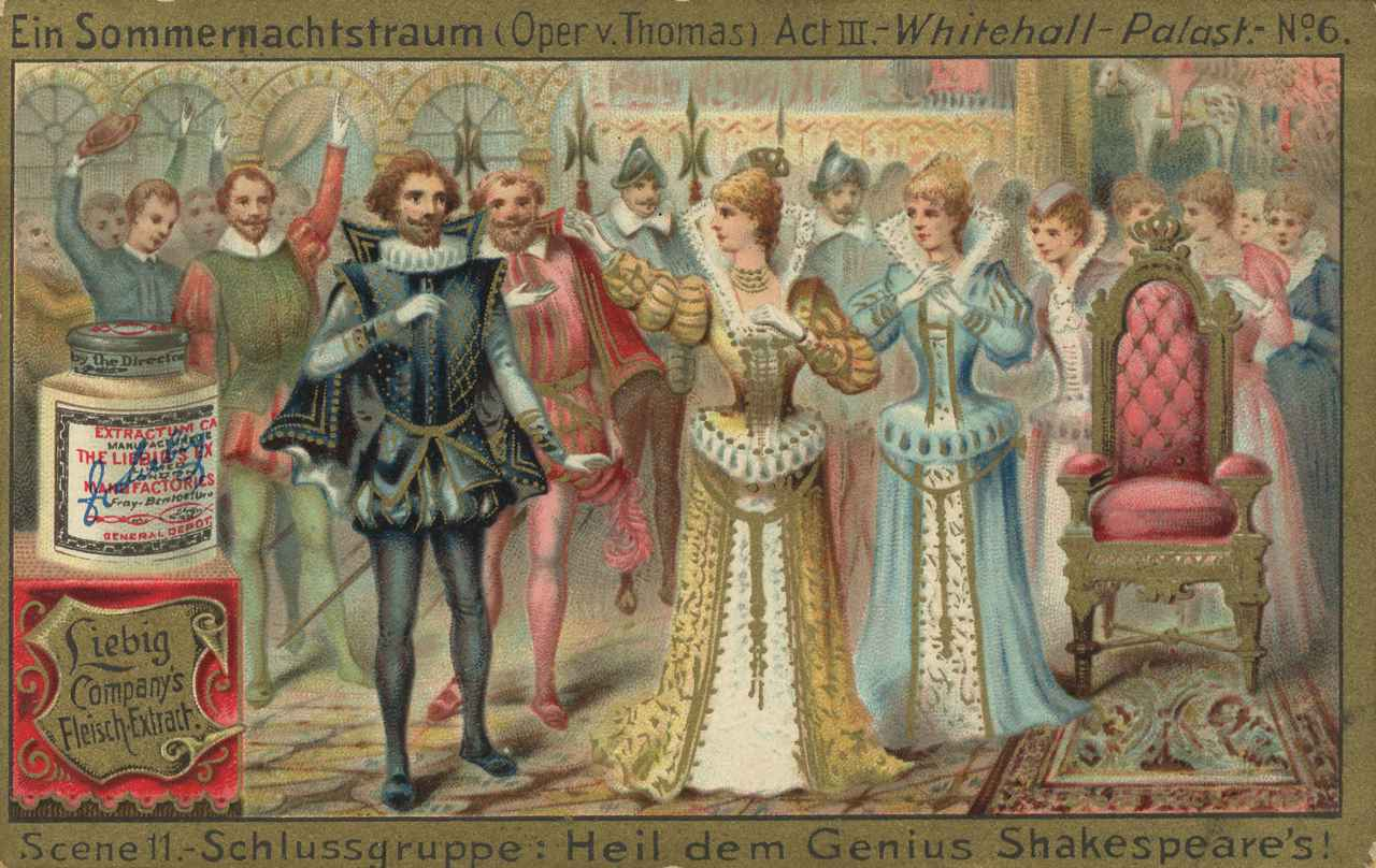 Act III. - Whitehall-Palast. No. 6 – Scene 11. – Schlußgruppe: Heil dem Genius Shakespeare’s!